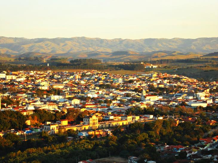 ESTAÇÃO FERROVIÁRIA CENTRAL DO BRASIL - CACHOEIRA PAULISTA